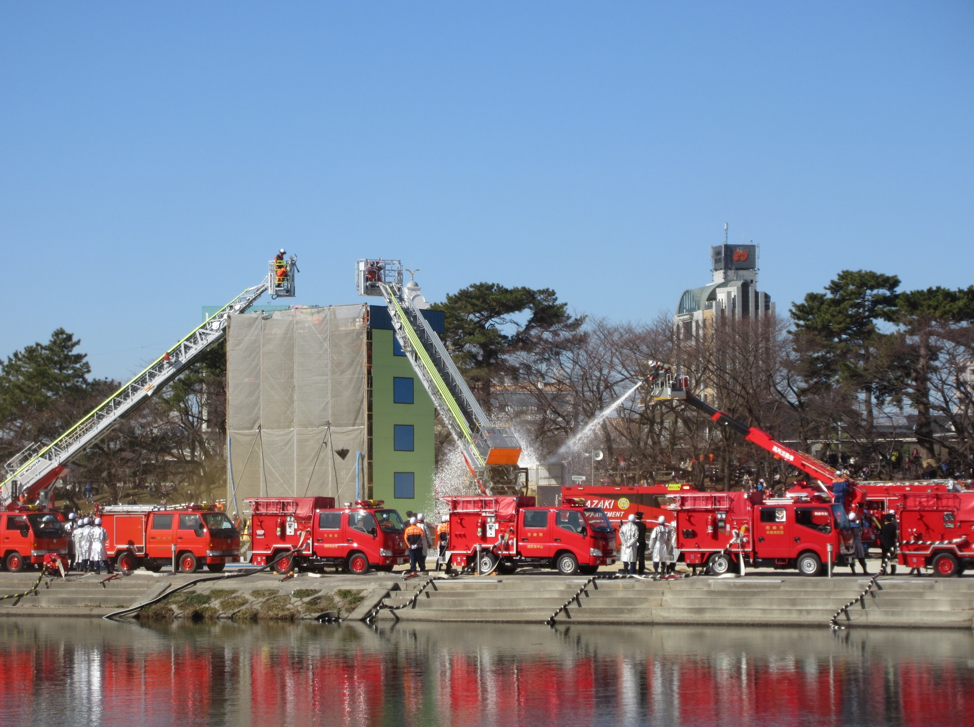 岡崎市消防出初式。乙川河川敷にて。